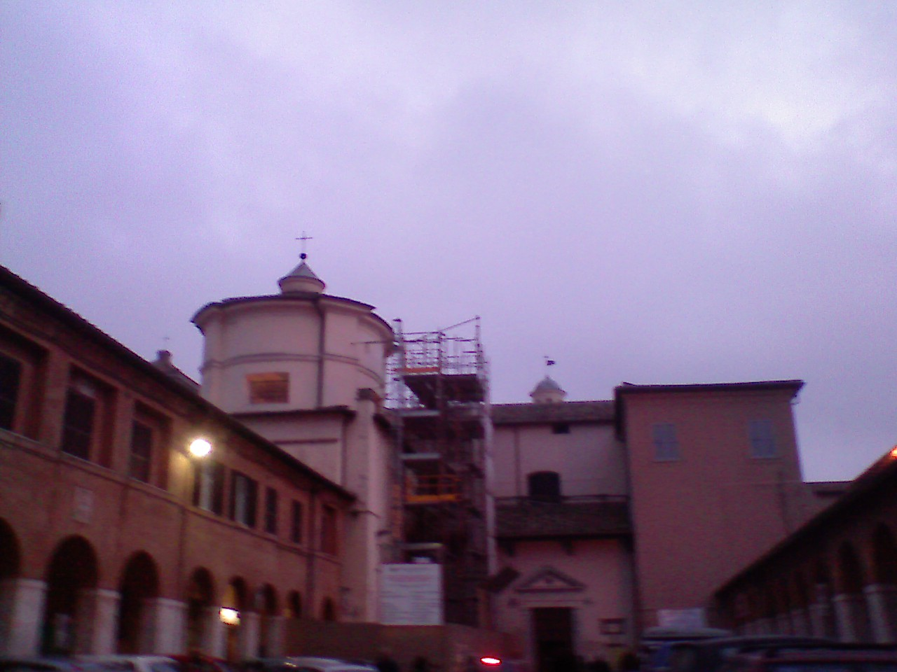 Cattedrale di Velletri